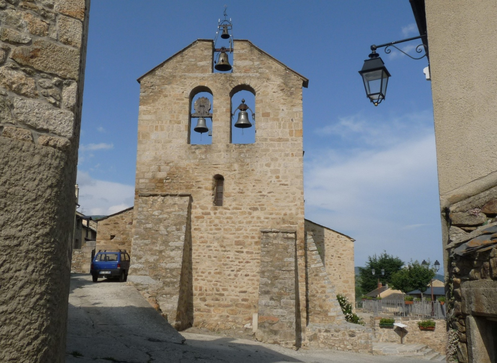 Eglise de Dorres, Pyrénées-Orientales, France